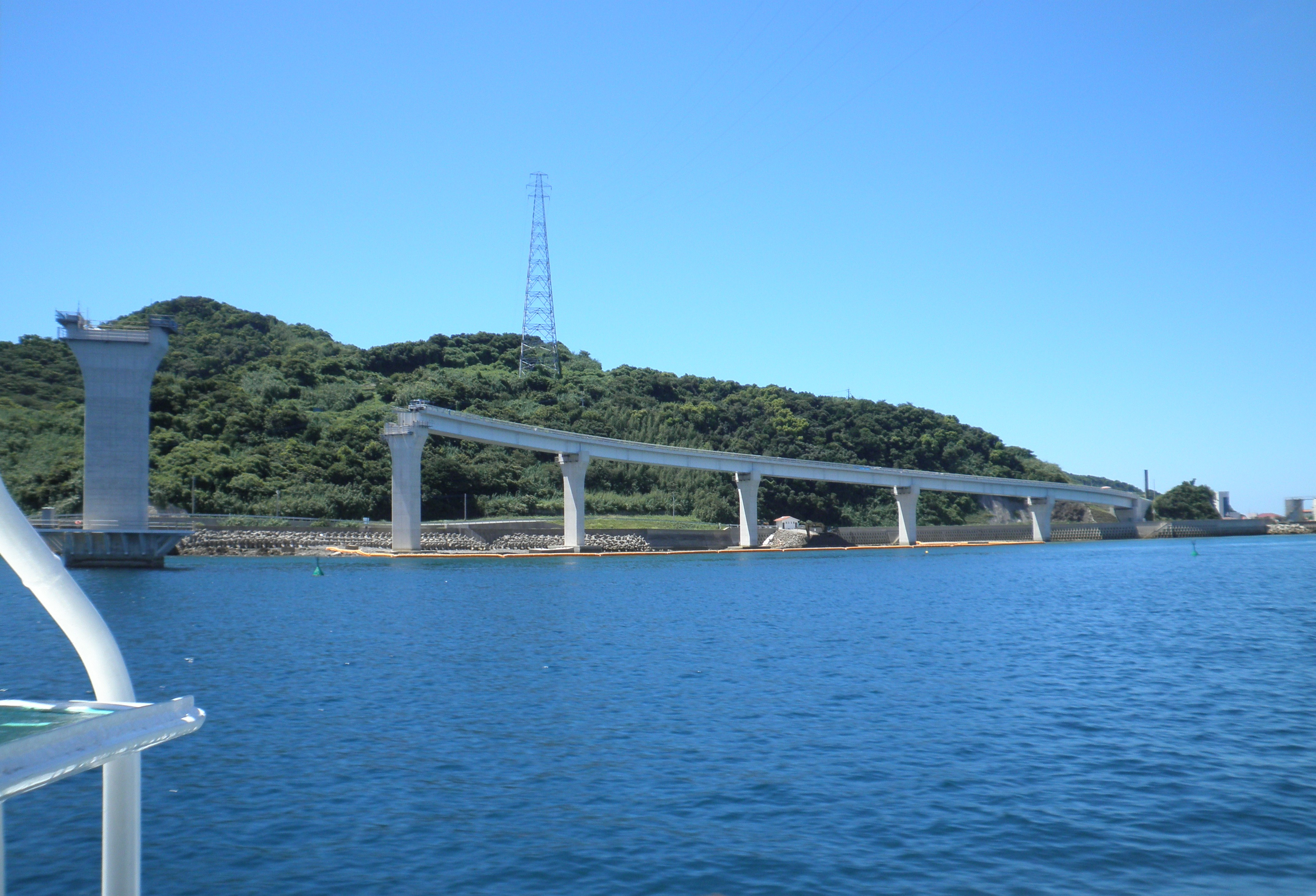 長崎市の離島である伊王島町沖ノ島と長崎市香焼町を結ぶ伊王島大橋の建設途中の姿。